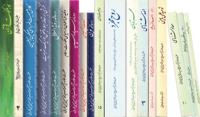 مجموعه کتب مرحوم علامه طهرانی